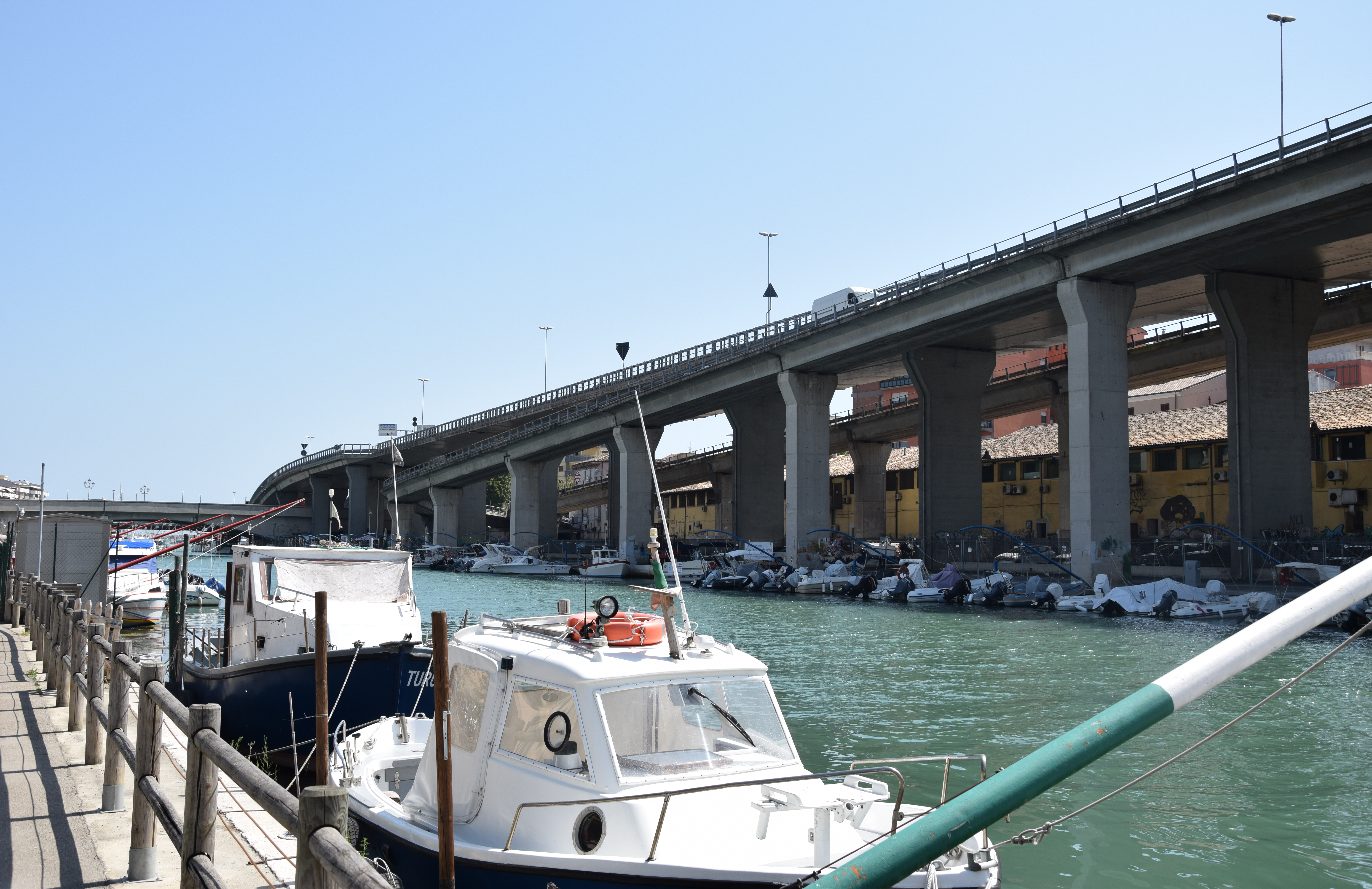 Il lungofiume di Pescara, con la lunga sopraelevata della S.S. 16 dir/C che sovrasta il centro storico